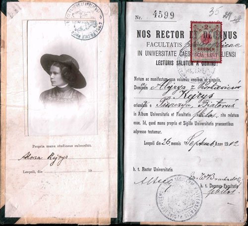 Заліковая кніжка студэнткі Львоўскага універсітэта А. Пашкевіч-Кейрыс. На лацінскай мове. 1912 г. Арыгінал.